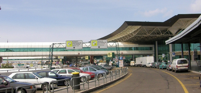 Der Flughafen Rom Fiumicino und eine Maschine der Alitalia